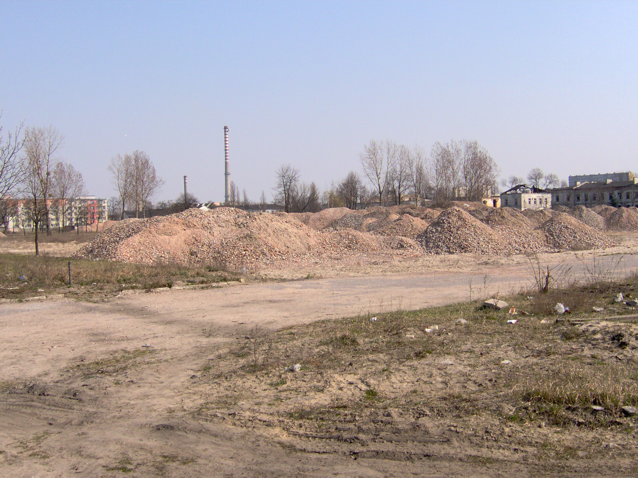 Pozostałości po byłej jednostki wojskowej przy ul. Żytniej 83 (2007 r.)